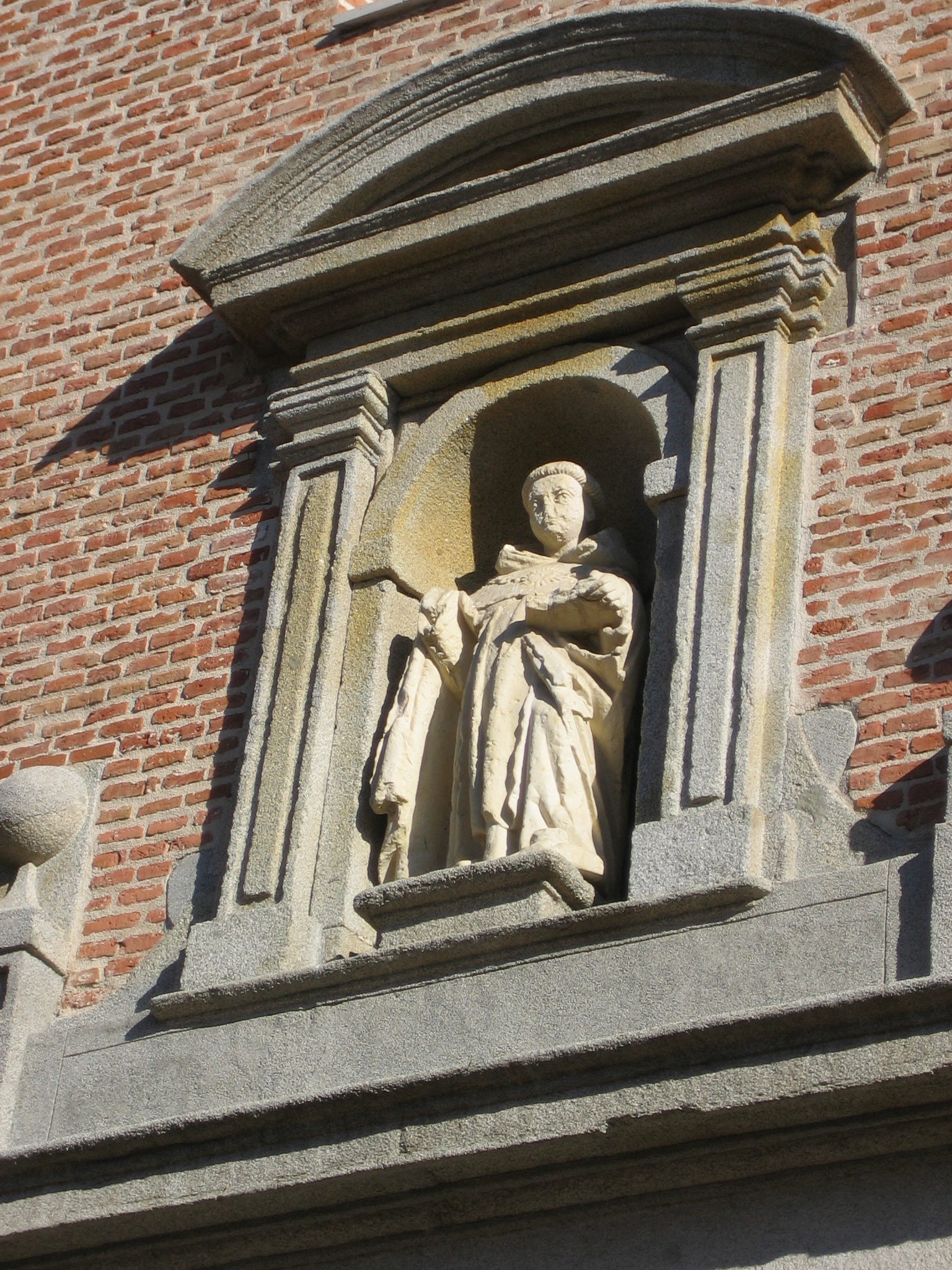 Detalle de la fachada del Convento de Santo Tomás (Parador de Alcalá de Henares)